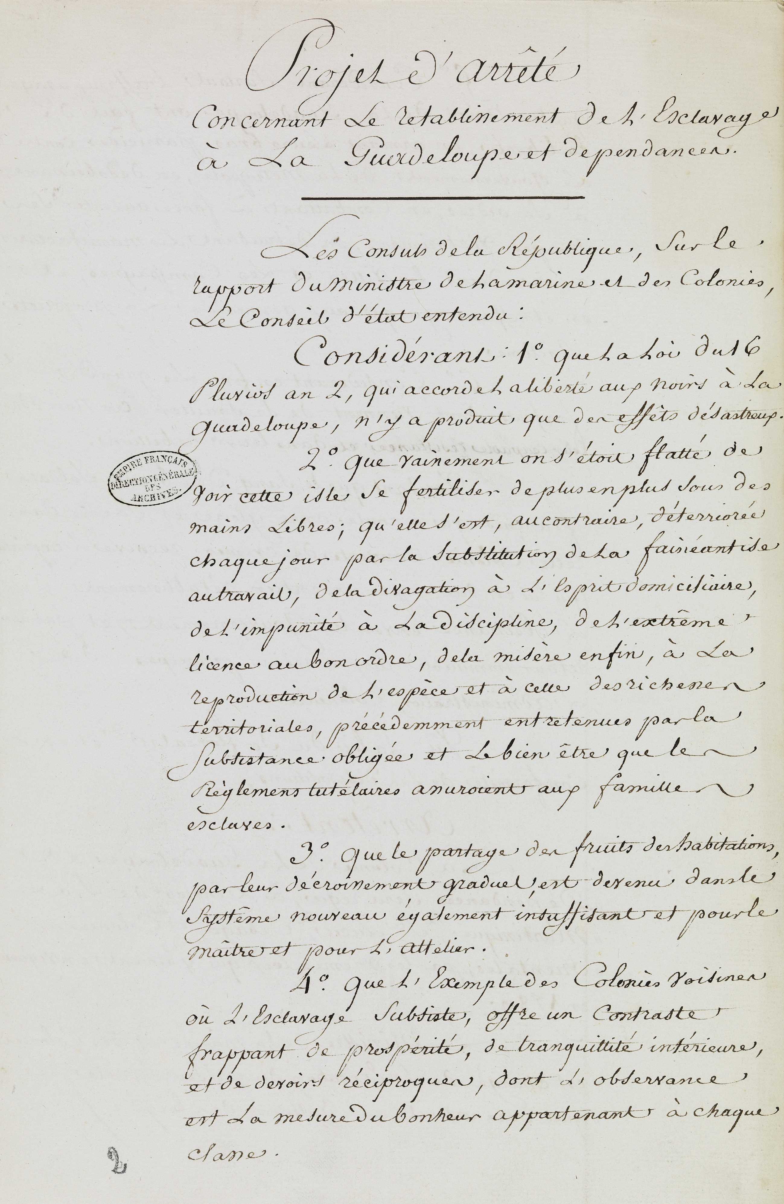 Arrêté consulaire de Bonaparte rétablissant l'esclavage à la Guadeloupe du 16 juillet 1802 : "Projet d'arrêté", manuscrit, p.1 (AN AF IV, 379)